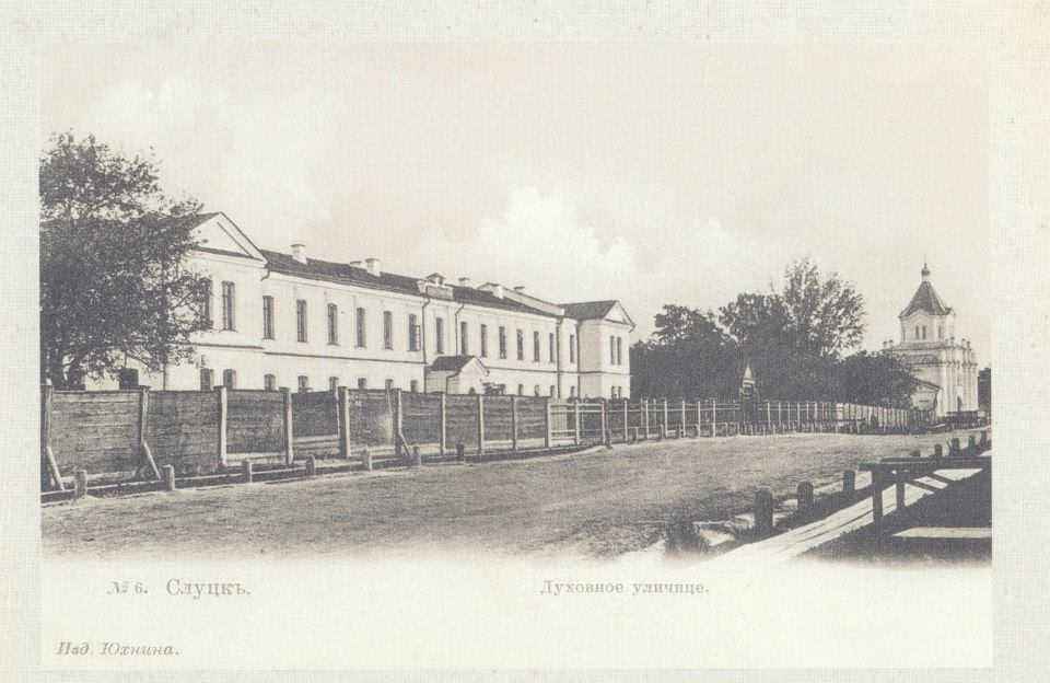 Беларуская (тарашкевіца): Слуцак (Słucak), вуліца Віленская (vulica Vilenskaja). Духоўная вучэльня